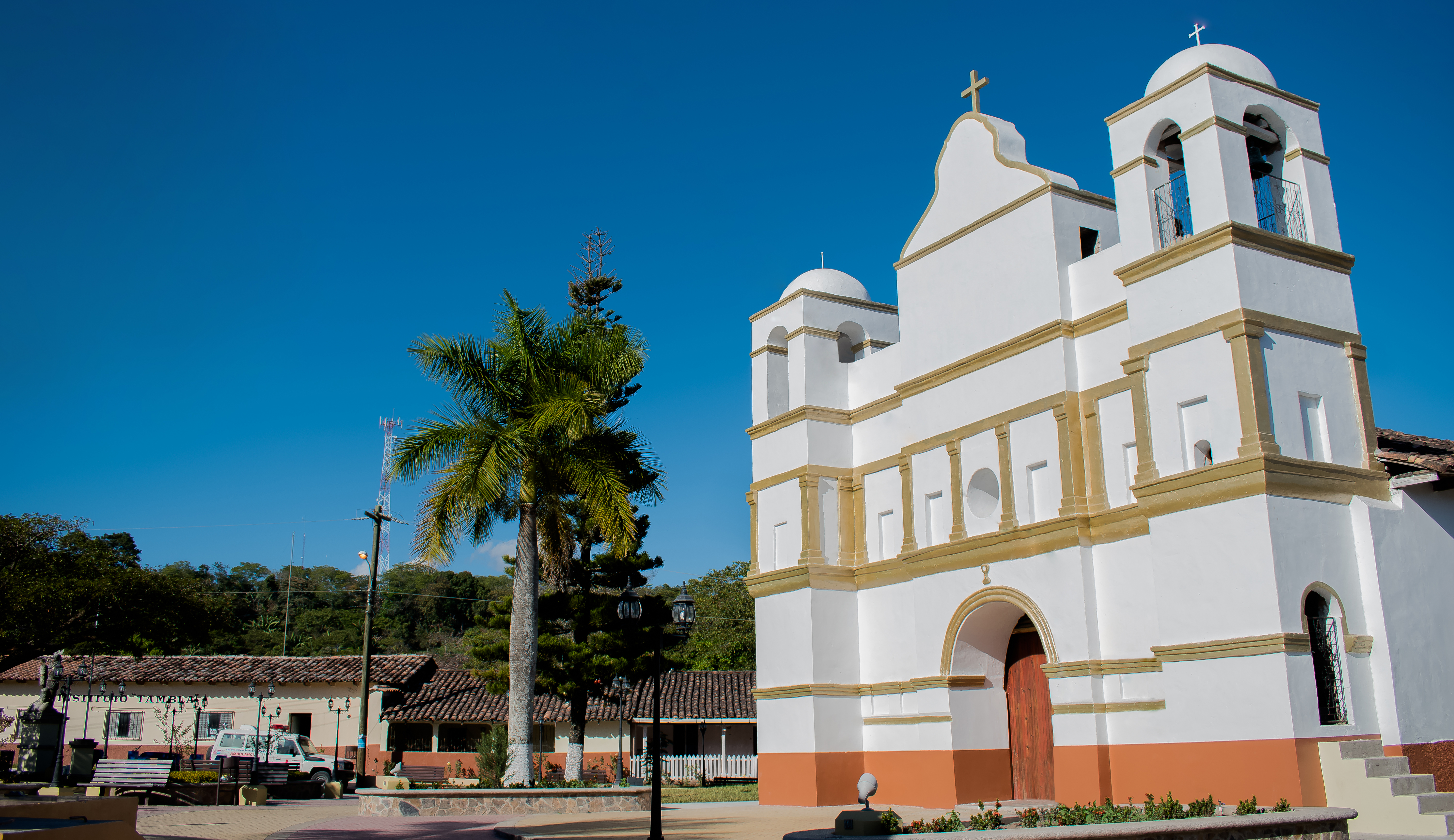 La Plaza Municipal de Tambla 2019.